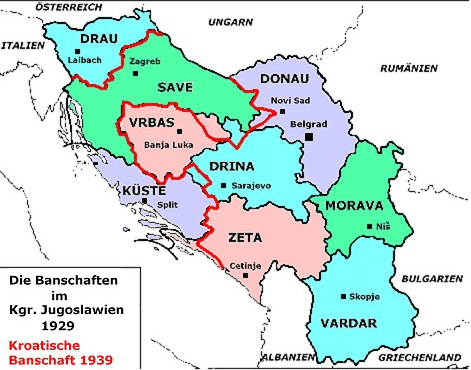 Die Banschaften Jugoslawiens 1929-1939/41 Bearbeitung einer Karte aus der deutschen Wikipedia